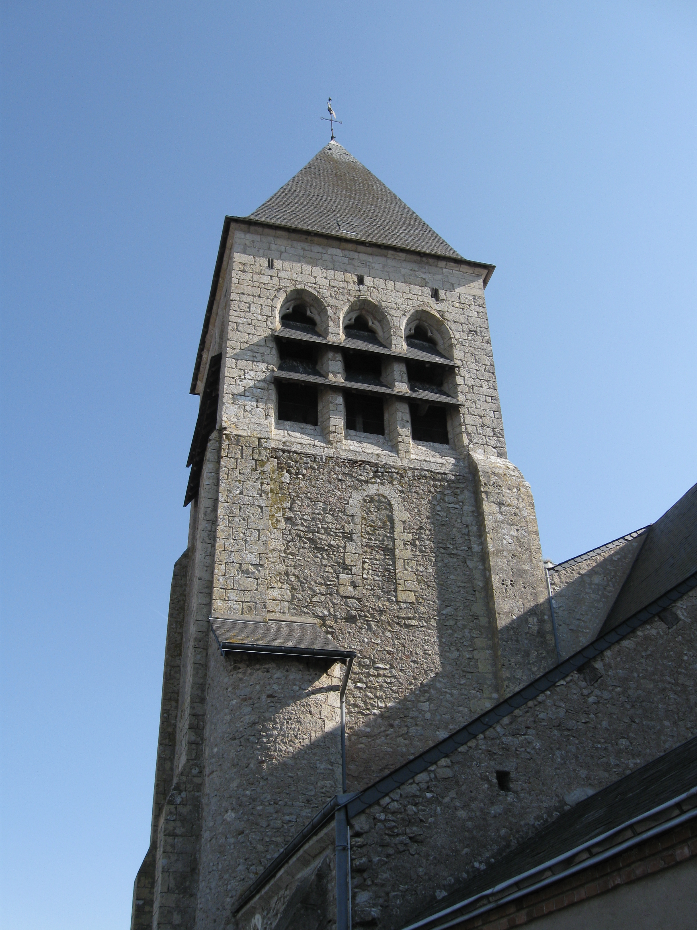 Église Saint-Georges, Bou, Loiret, France